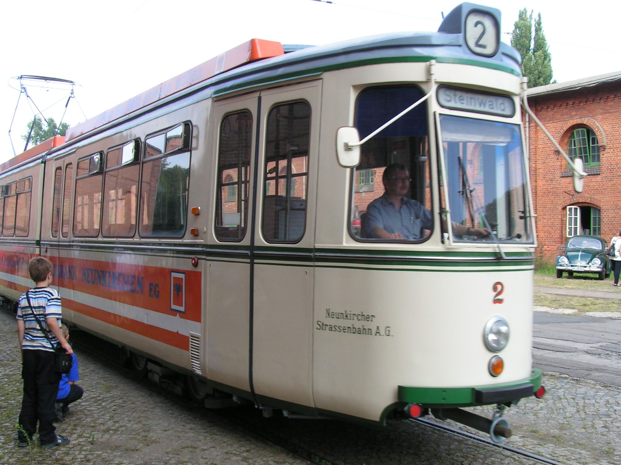 Historisches Fahrzeug der Neunkircher Straßenbahn aus Neunkirchen (Saar); fotografiert im Hannoverschen Straßenbahnmuseum, Sehnde-Wehmingen